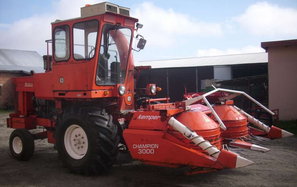 prawy bok